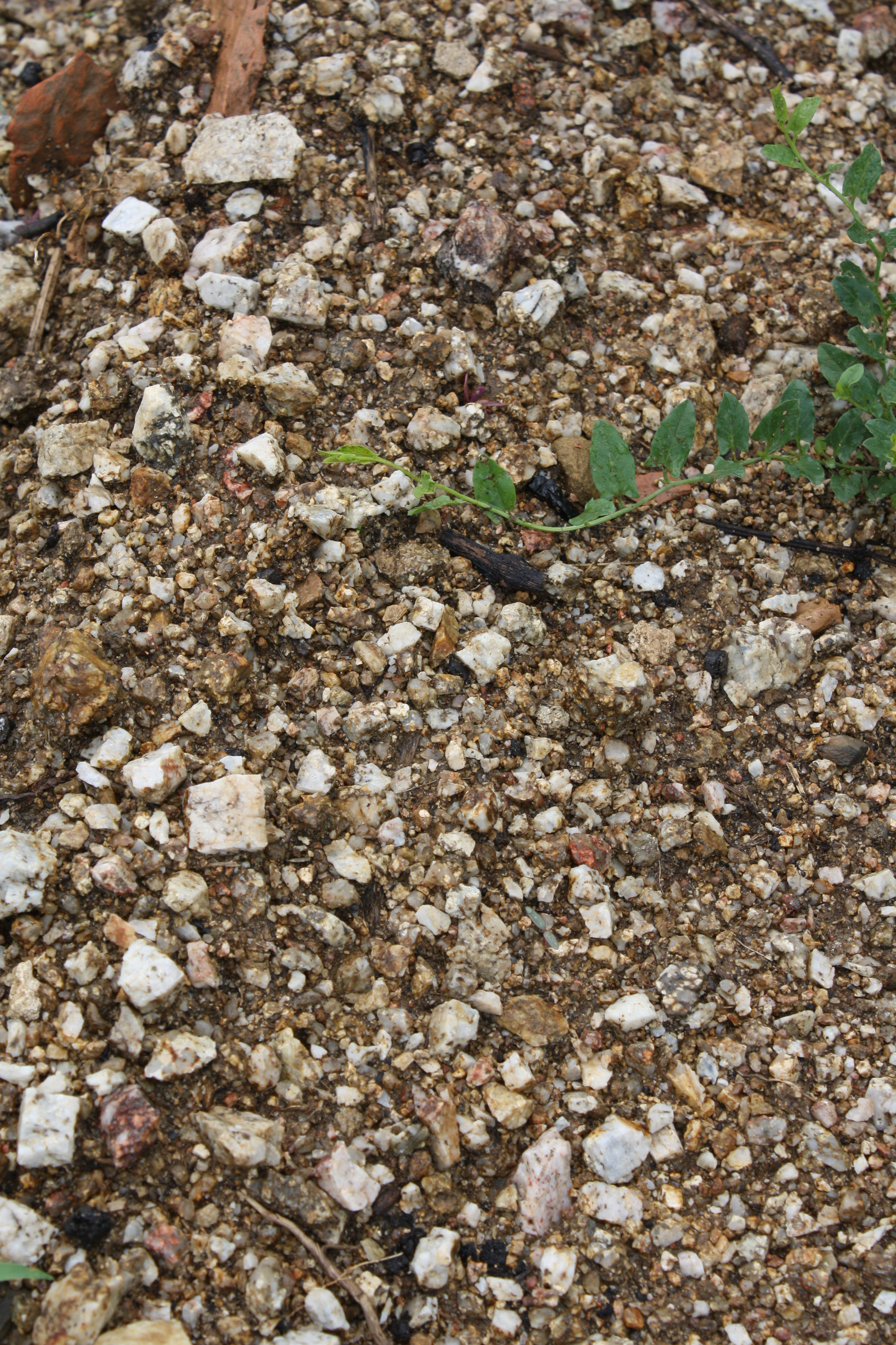 Terroir granitique de Tain l'Hermitage